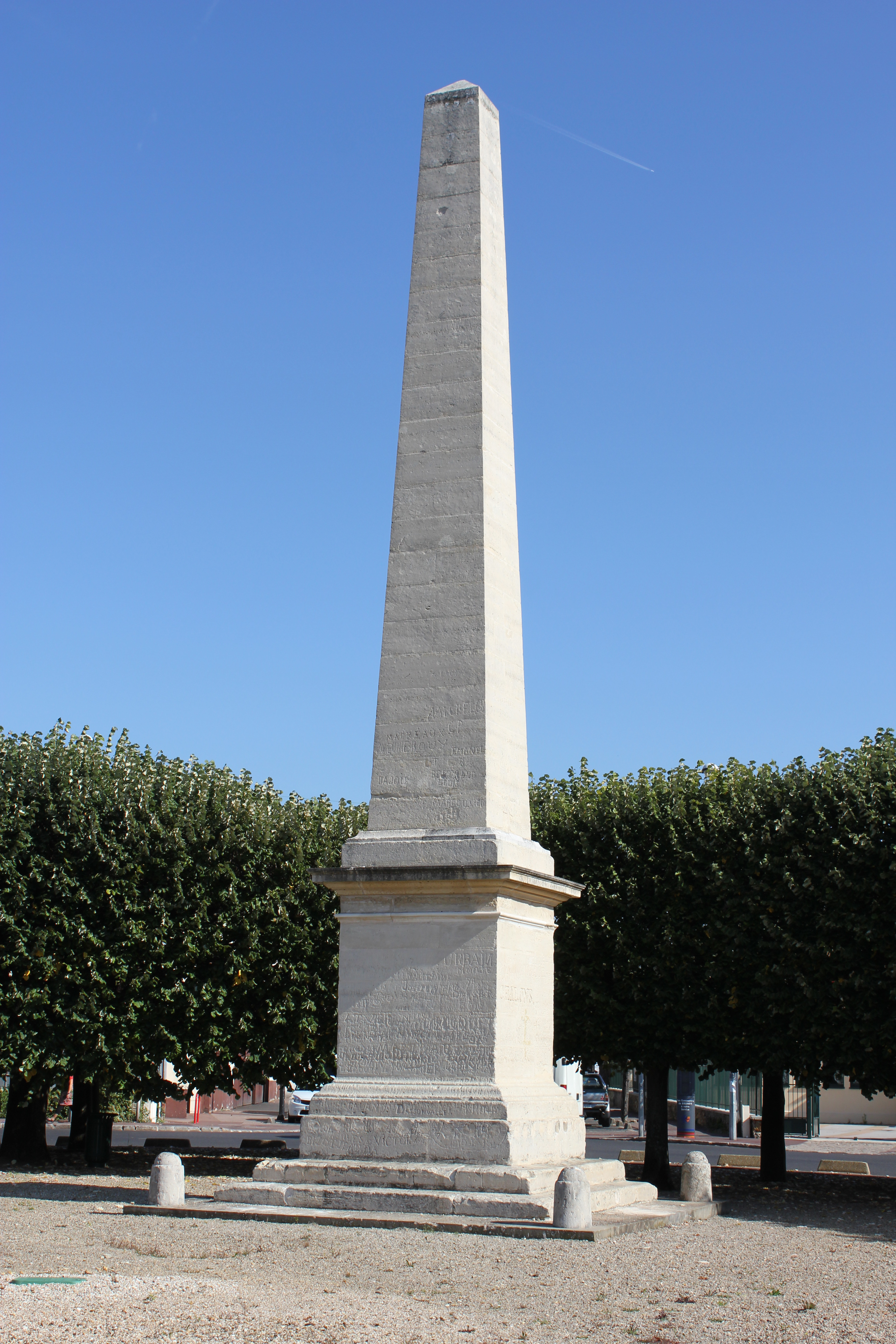 Obélisque de Brunoy - également connu sous le nom de la pyramide .